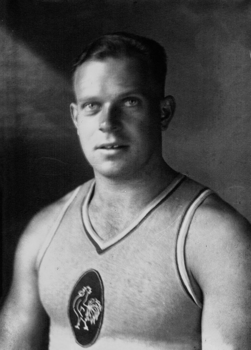 Paul Winter, lanceur de poids, en 1930